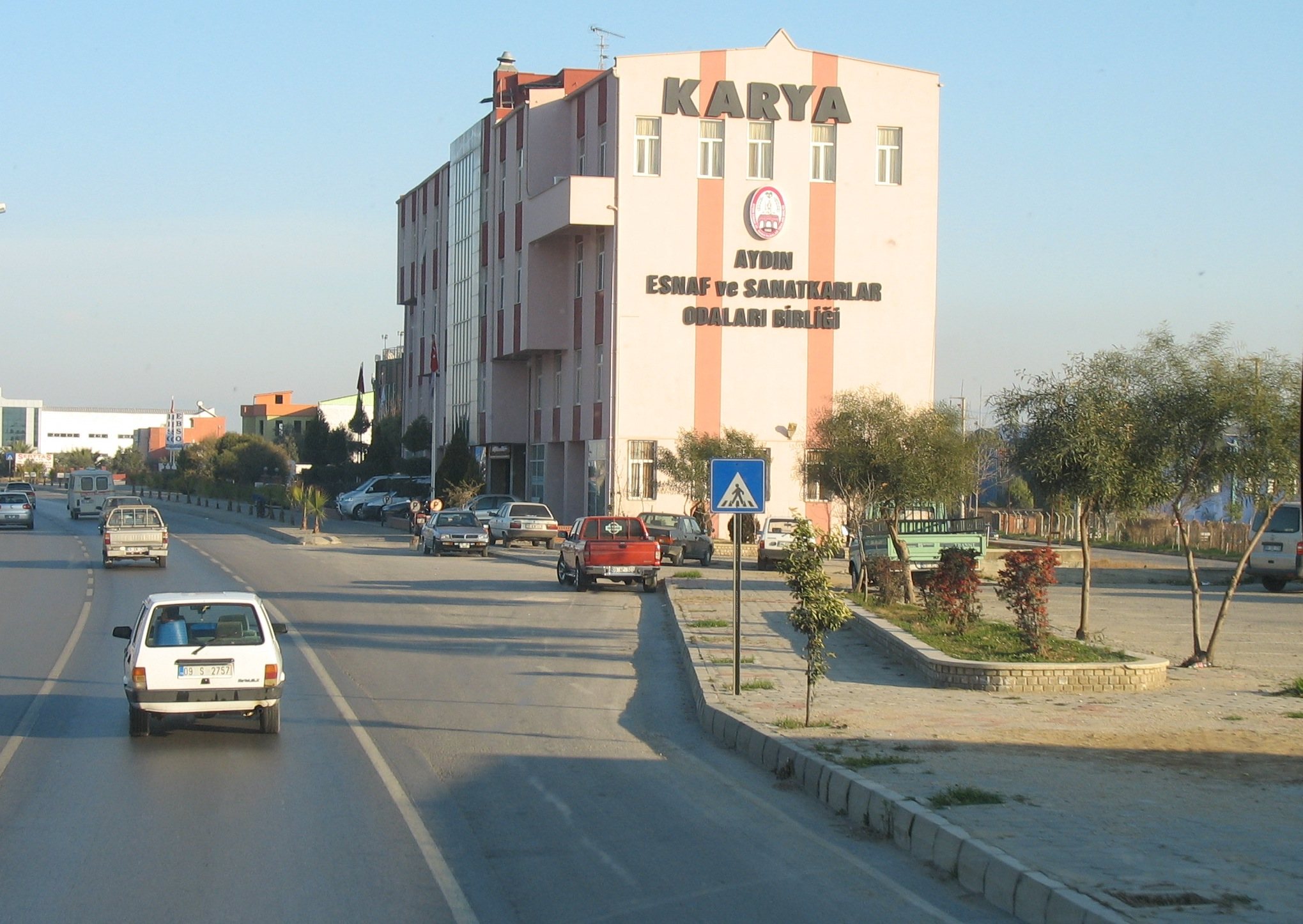 Aydın merkez